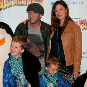 Оскар Кучера с семьёй на премьере продолжения франшизы «Мадагаскар 3» 2 июня 2012 года